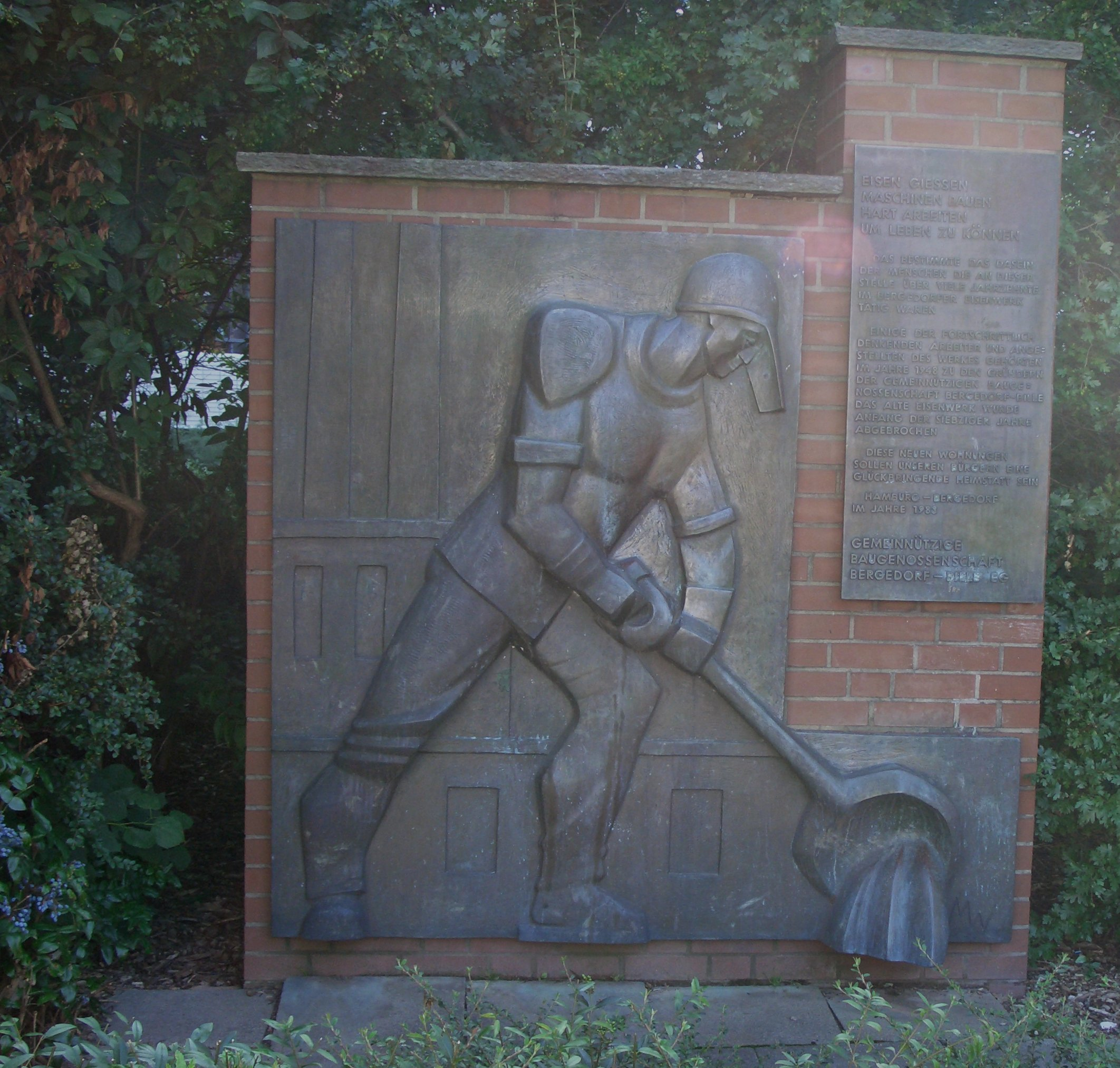 Denkmal an die Gründung der Baugenossenschaft Bergedorf Bille e.G. Ort: Hamburg-Bergedorf: Ecke Rosenberg Ring / Wilhelm Bergner Strasse Quelle: Fotografiert am 3.8.2005 Fotograf: Habe ich selbst fotografiert